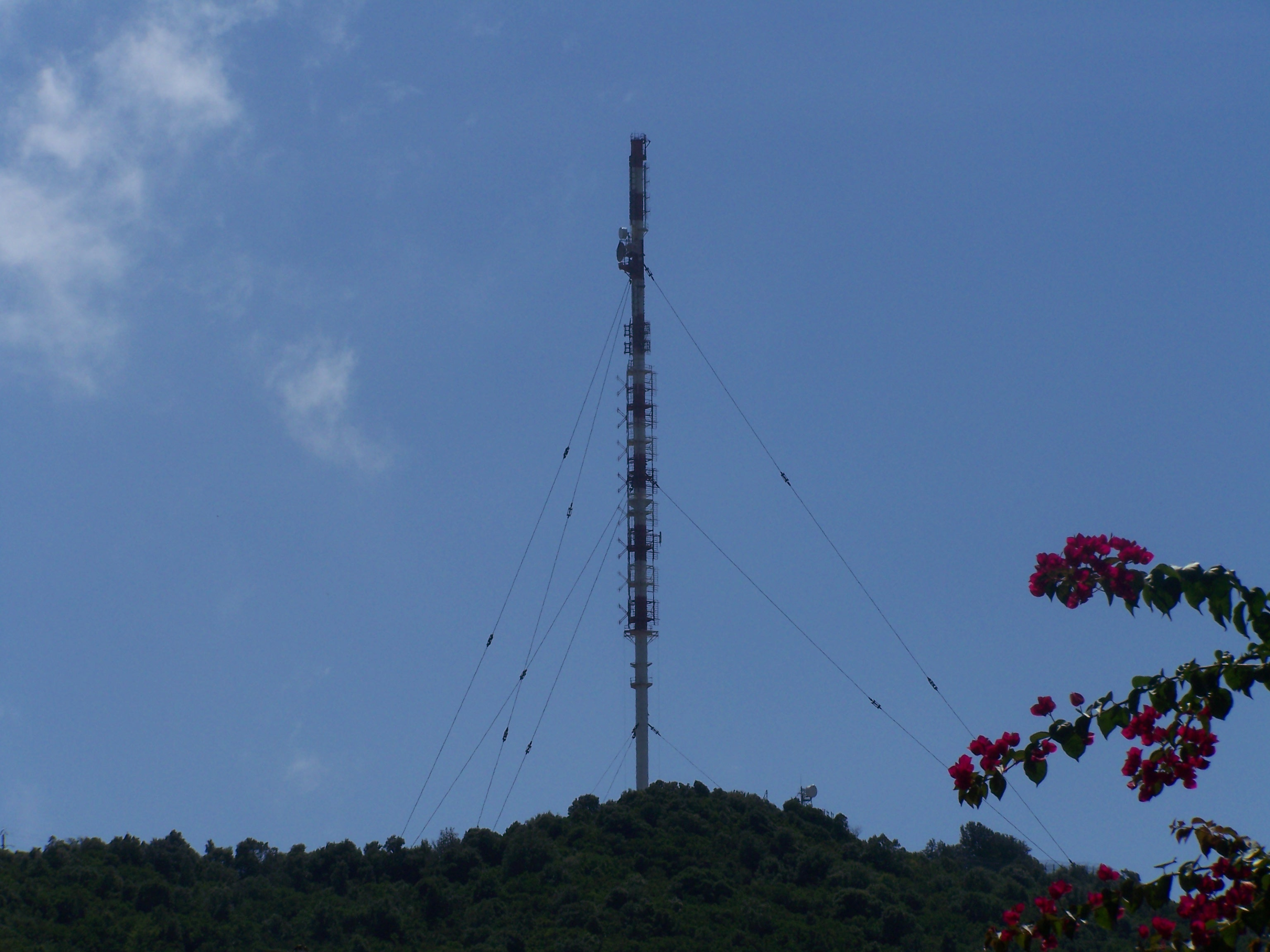 Émetteur de Coti-Chiavari, Corse-du-Sud (2A)